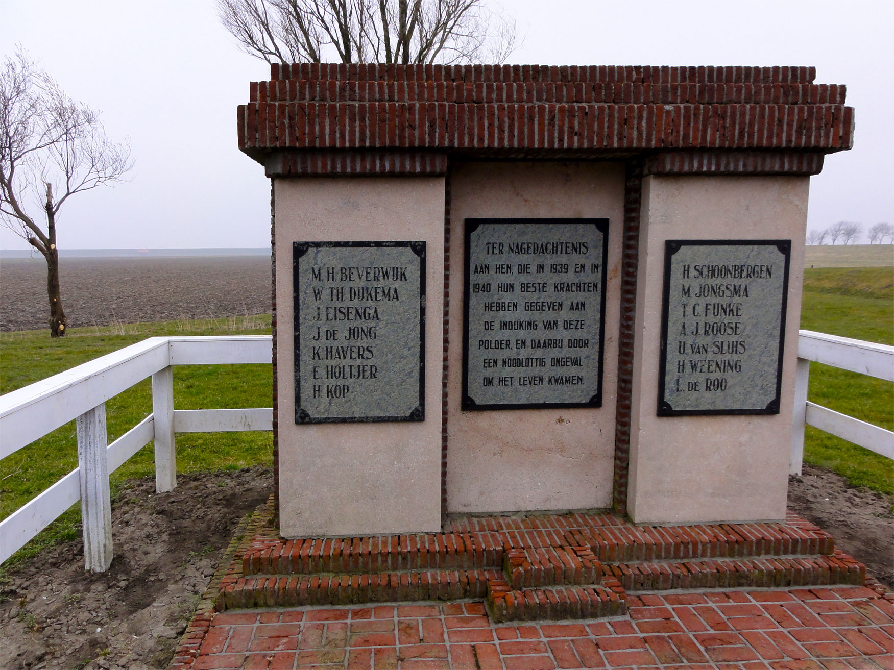 Monument ter herinnering van en noodlottig ongeval waarbij 14 mensen, die werkzaam waren bij de inpoldering, omkwamen bij een busongeluk in 1940, toen hun bus gegrepen werd door een trein op een onbewaakte overweg